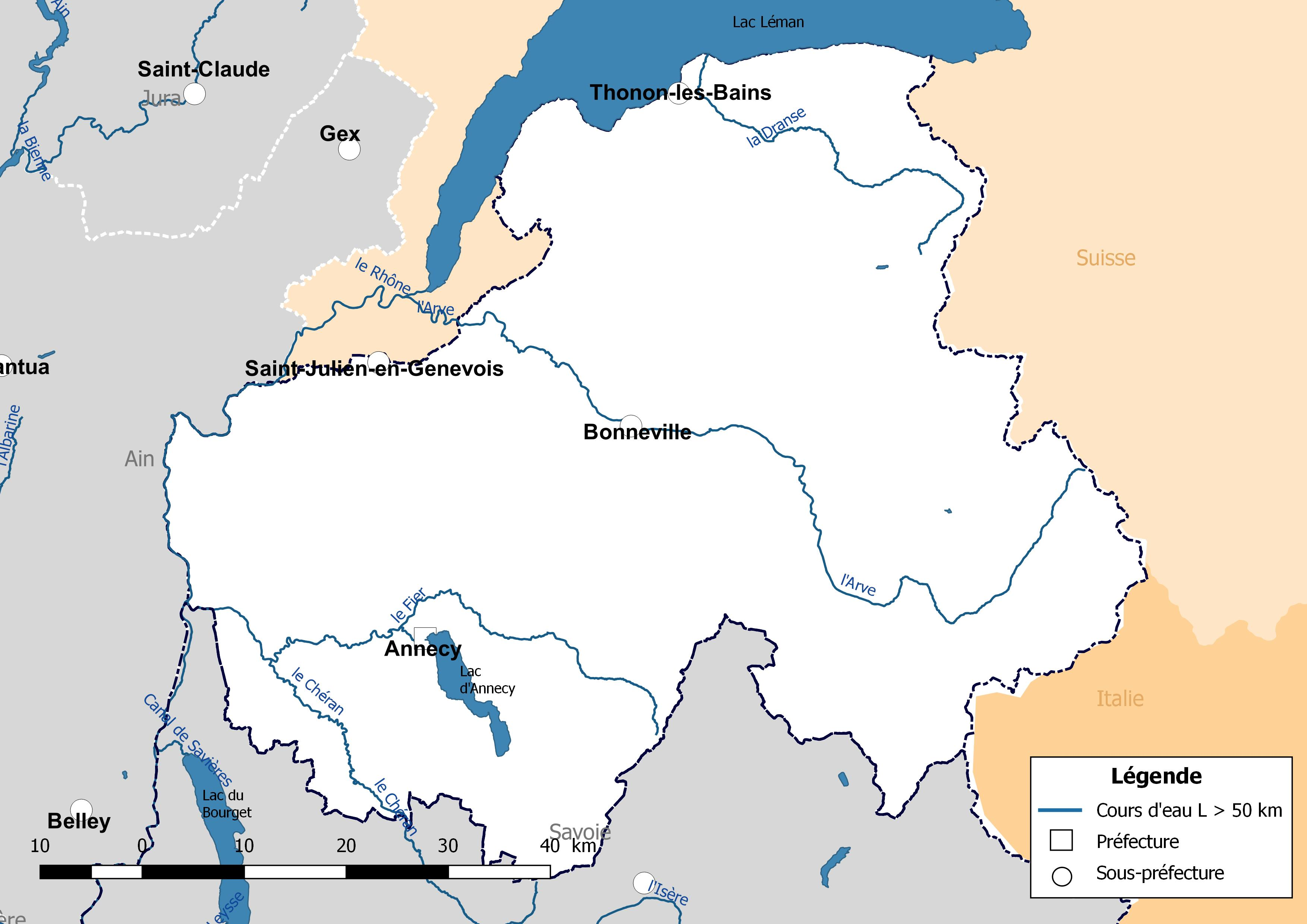 Carte des cours d'eau de longueur supérieure à 50 km drainant le département de la Haute-Savoie (France).